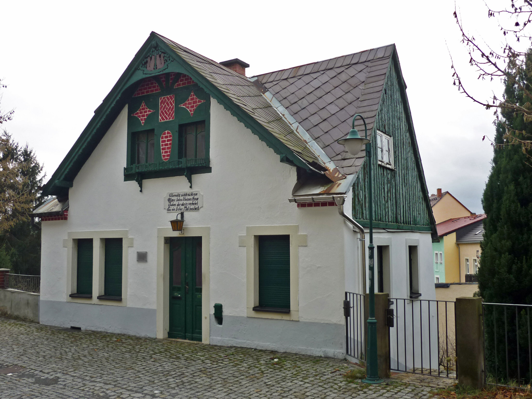 "Lips-Tullian-Haus" im Schulgäßchen in Dippoldiswalde (Sachsen), soll 1710 von Lips Tullian genutzt worden sein